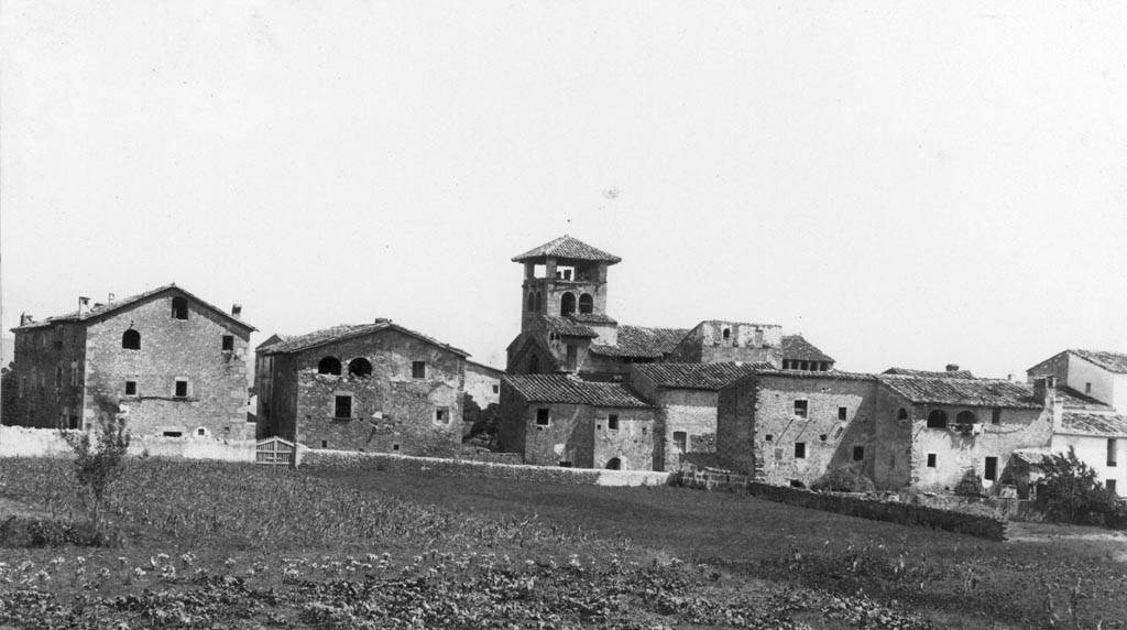 Vista parcial de Serinyà. Juli Vintró i Casallachs (Entre 1890 i 1911)